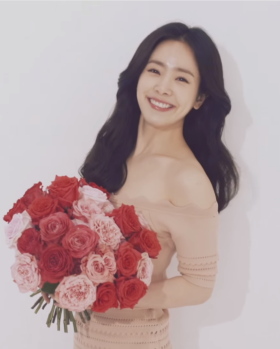 한지민의 마리끌레르 코리아 여성의 날 화보